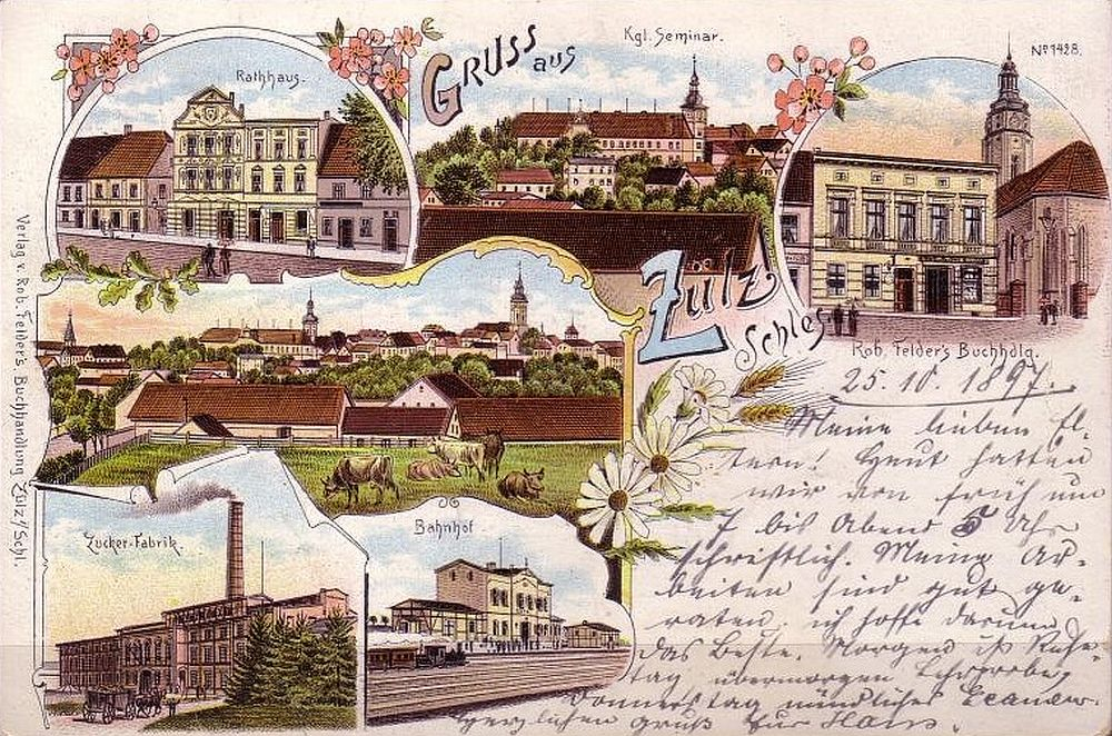 Biała na litografii - panorama miasta, ratusz, zamek Prószkowskich, cukrownię oraz dworzec